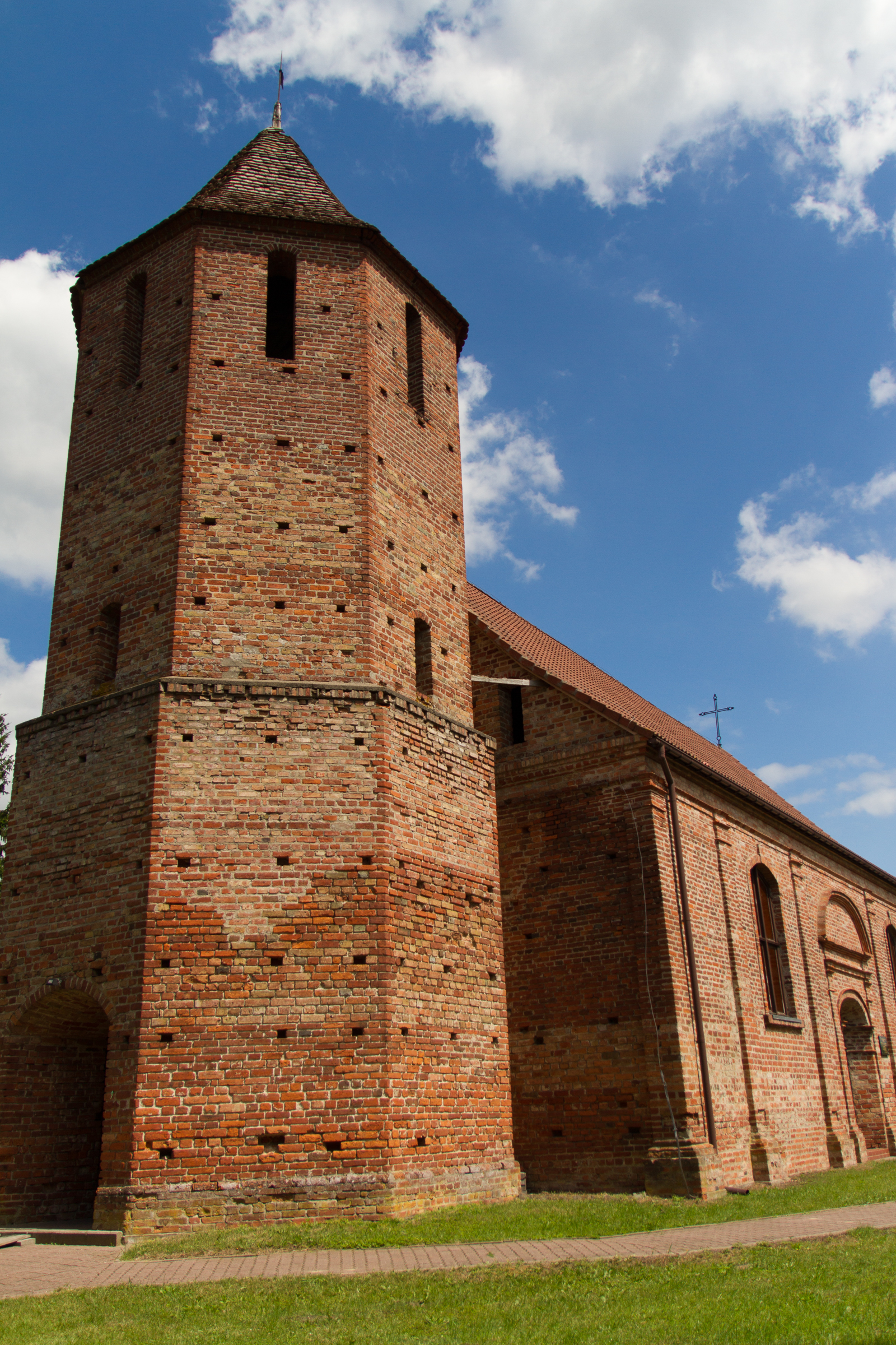 Strzmiele, kościół ewangelicki, ob. rzym.-kat. fil. p.w. NMP i św. Andrzeja, 1722